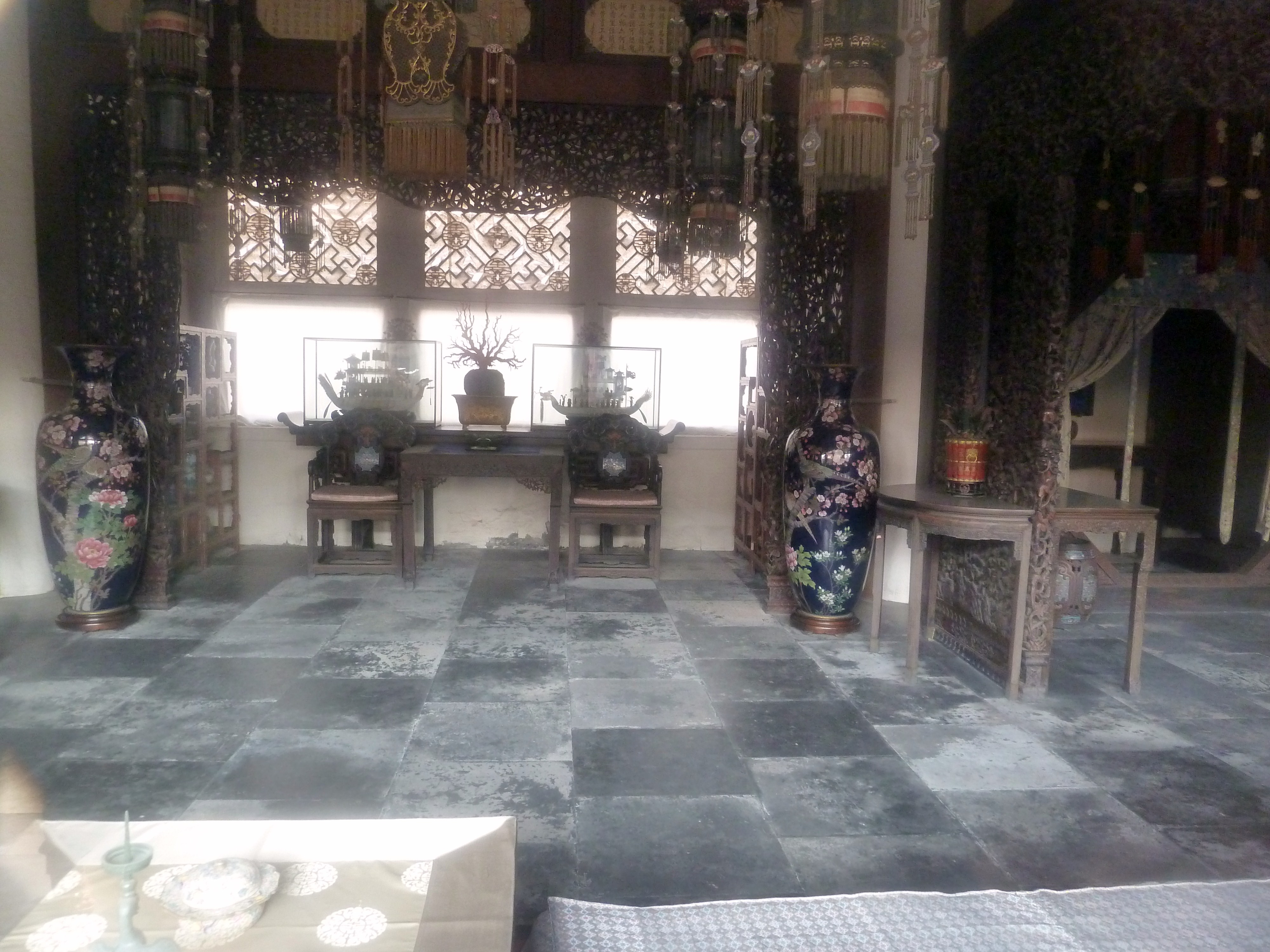 Dans la Cité_interdite, à Pékin .- ,Chine